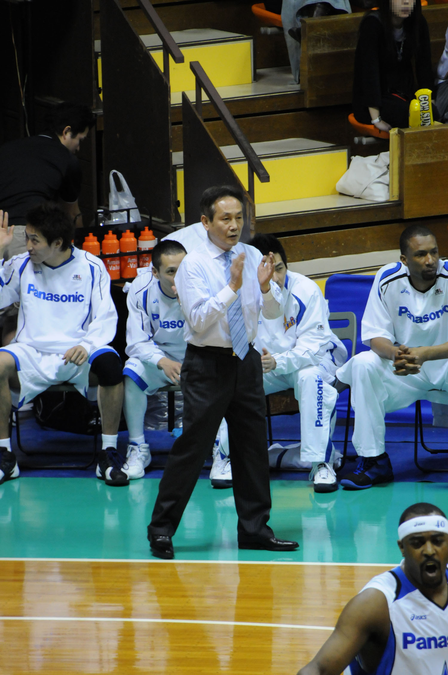 パナソニックトライアンズ、清水良規ヘッドコーチ。代々木第二体育館で。